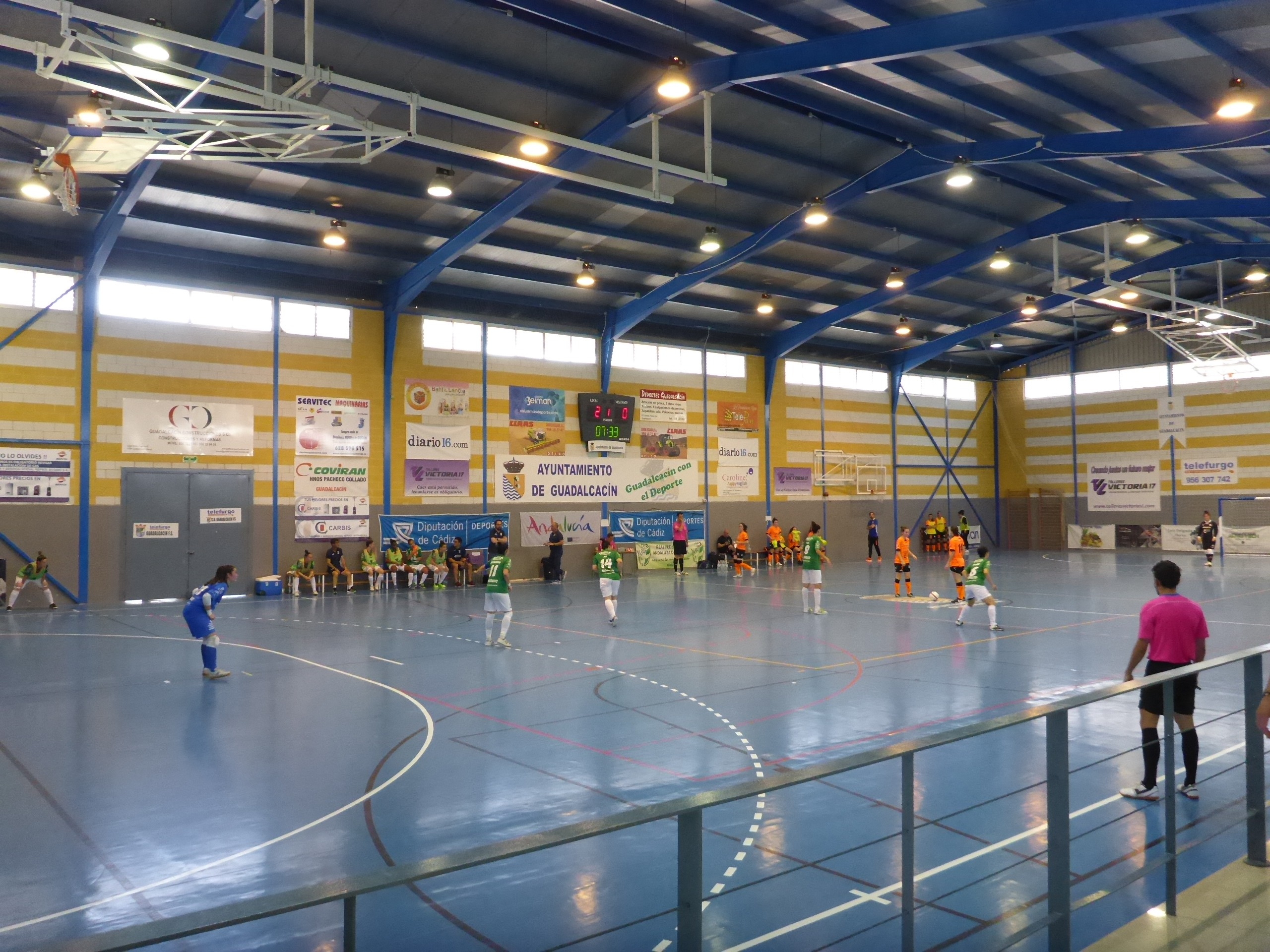 Partido Guadalcacín FS CD - Viaxes Amarelle FS, 25 Mayo 2019 Primera División de fútbol sala femenino en el Polideportivo Municipal de Guadalcacín